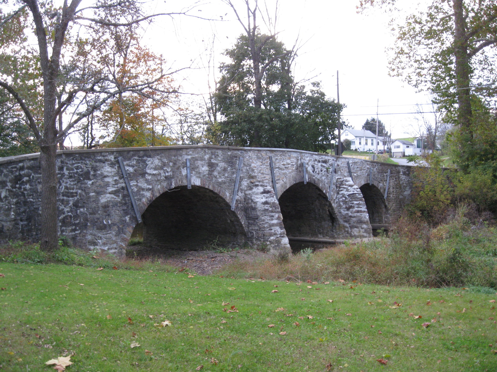 Trexler, Pennsylvania